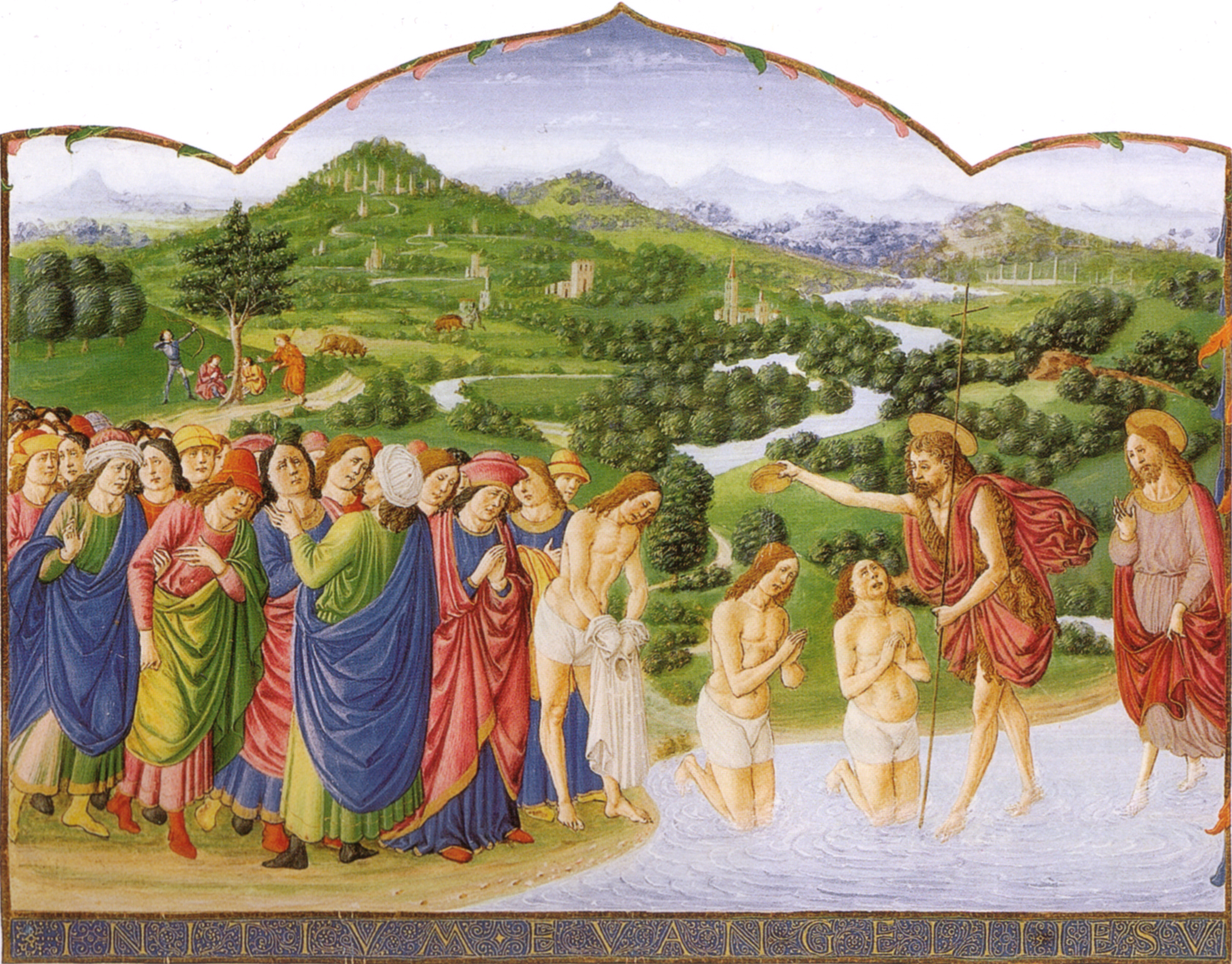 Francesco di antonio del chierico, san giovanni battista battezza le folle, bibl apostolica vaticana, bibbia ms. urb lat. 2 f 215r